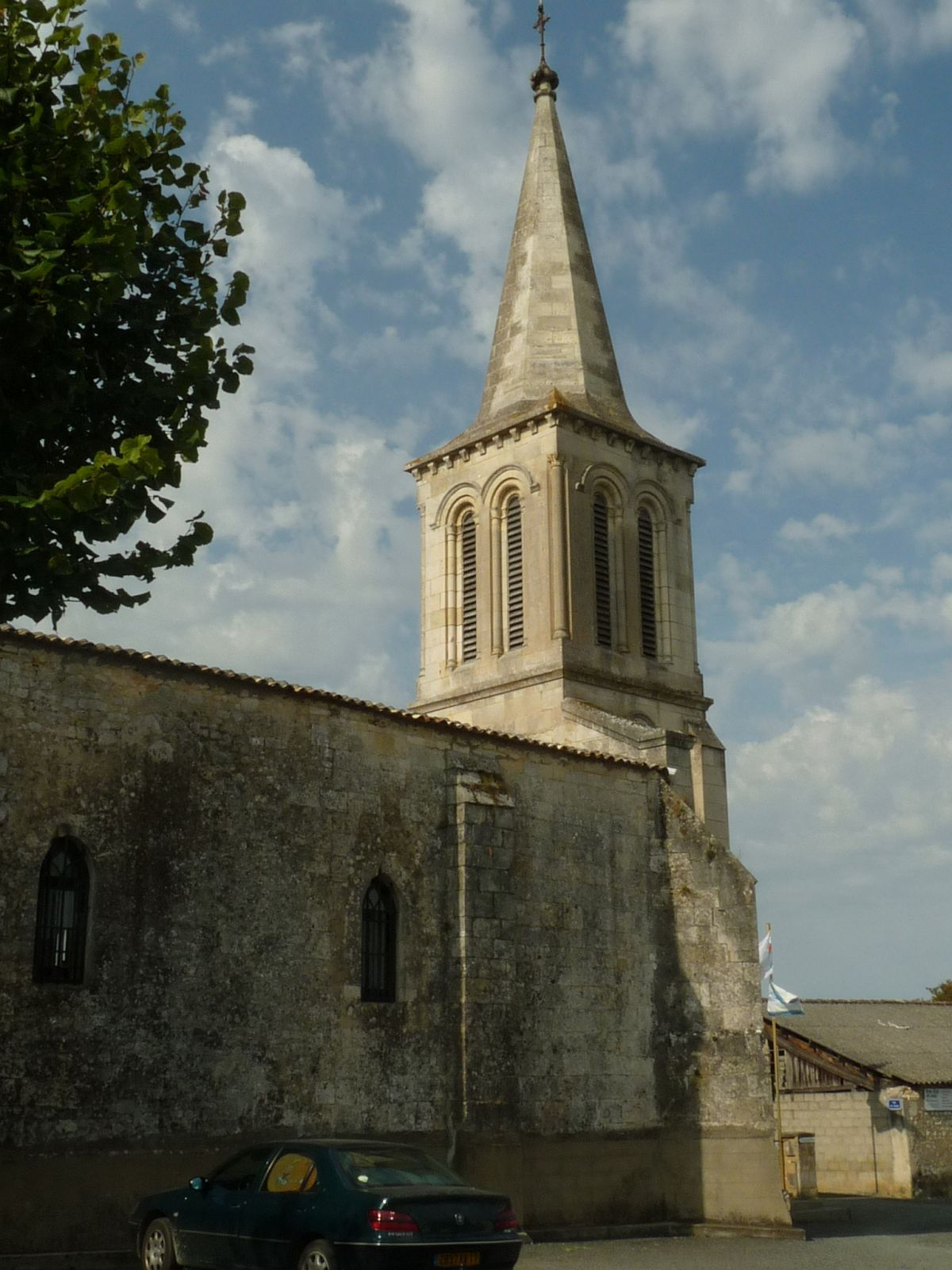 église de St-Germain-du-Seudre (17), France